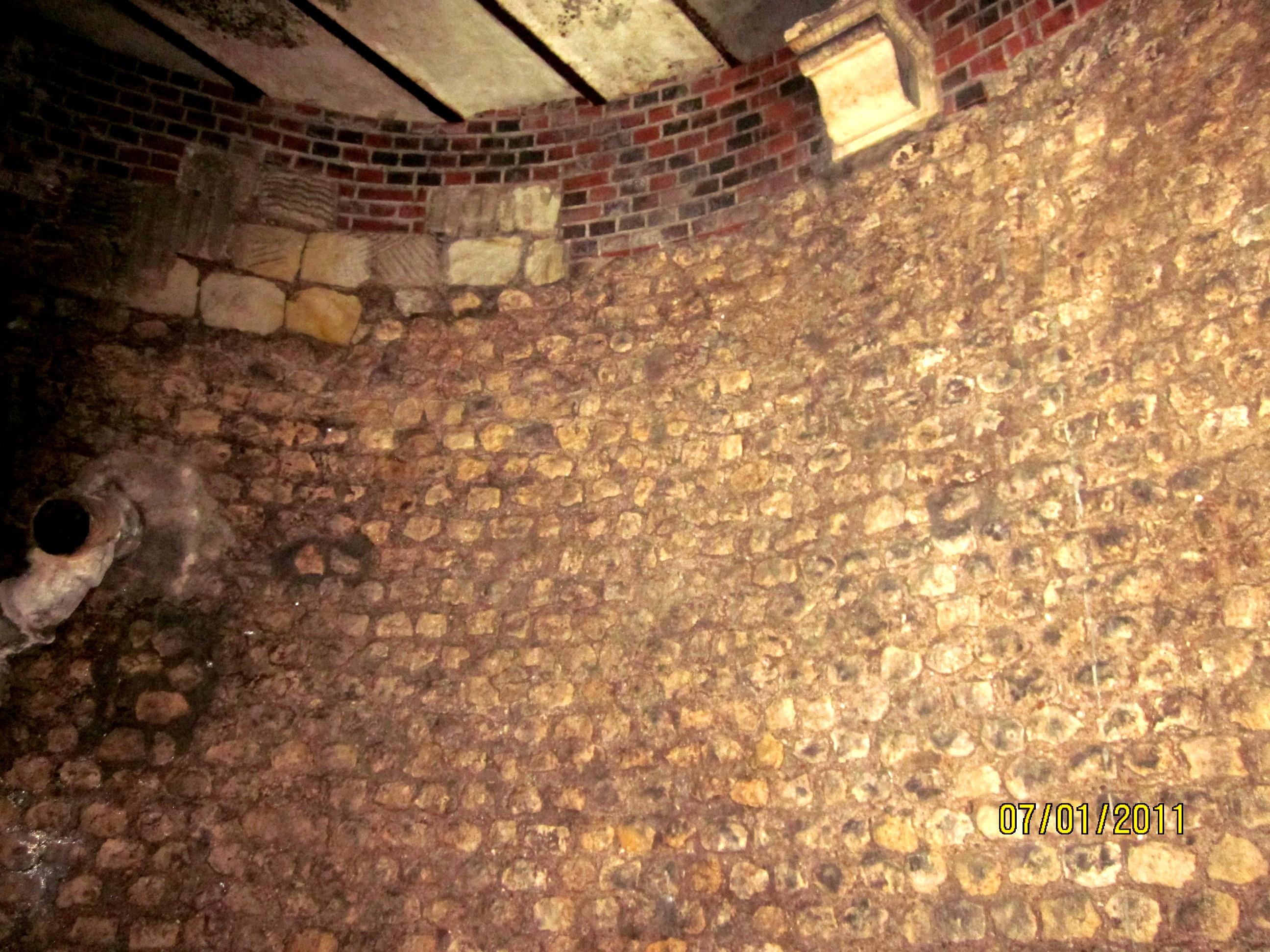 tour de soutènement amphi Tours